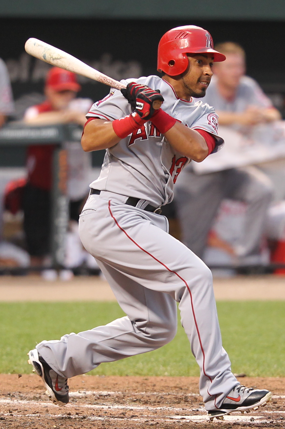 Maicer Izturis